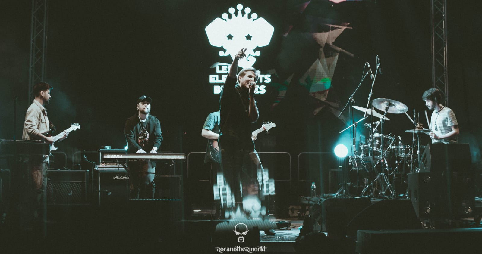 Elefanții, pe scena la Rocanotherworld 2019. De la stanga la dreapta avem: Enver, Tudor, Stefan, Mario (în spatele lui Ștefan) și Alex